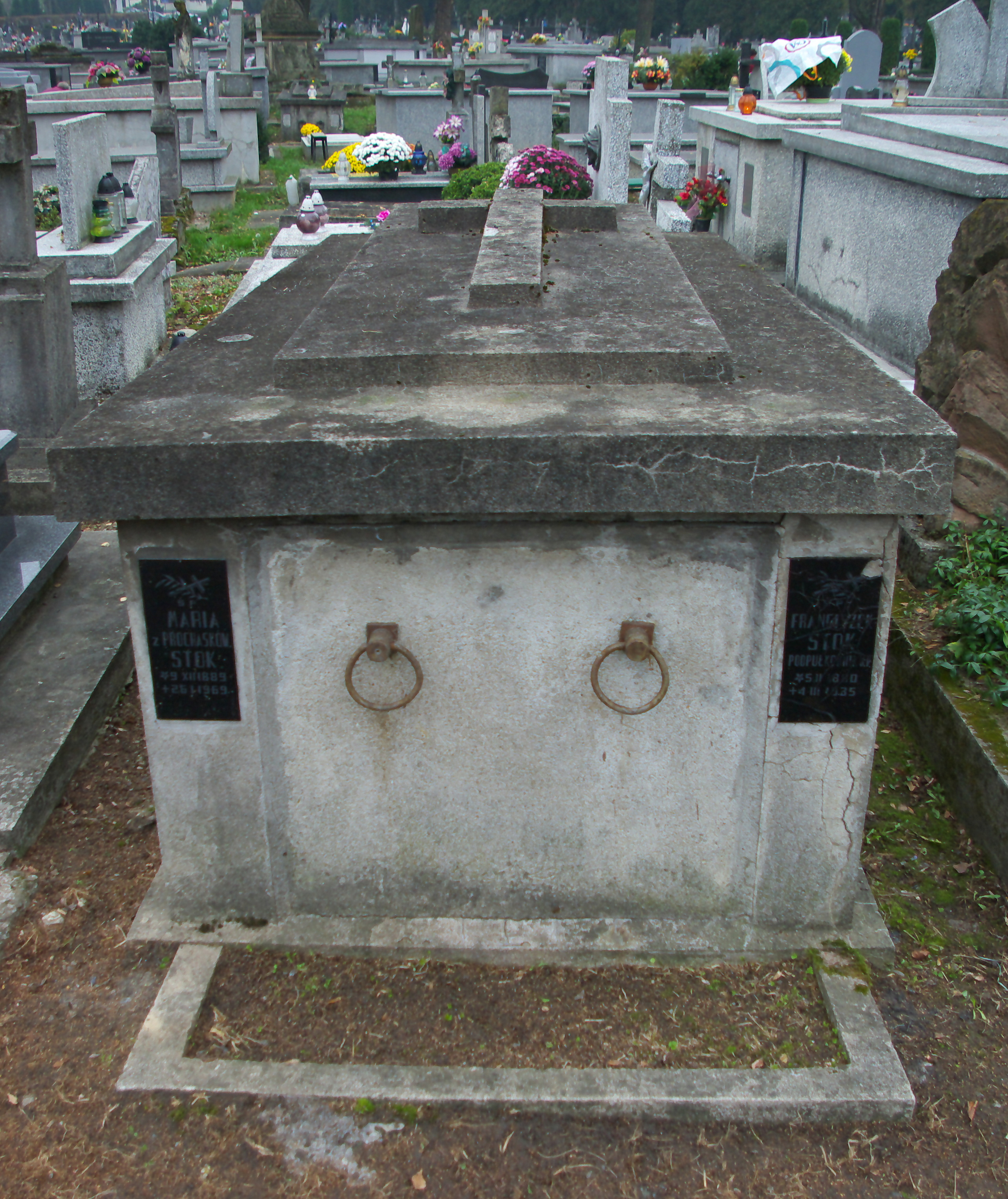 Nagrobek Franciszka i Marii Stok na Cmentarzu Centralnym w Sanoku